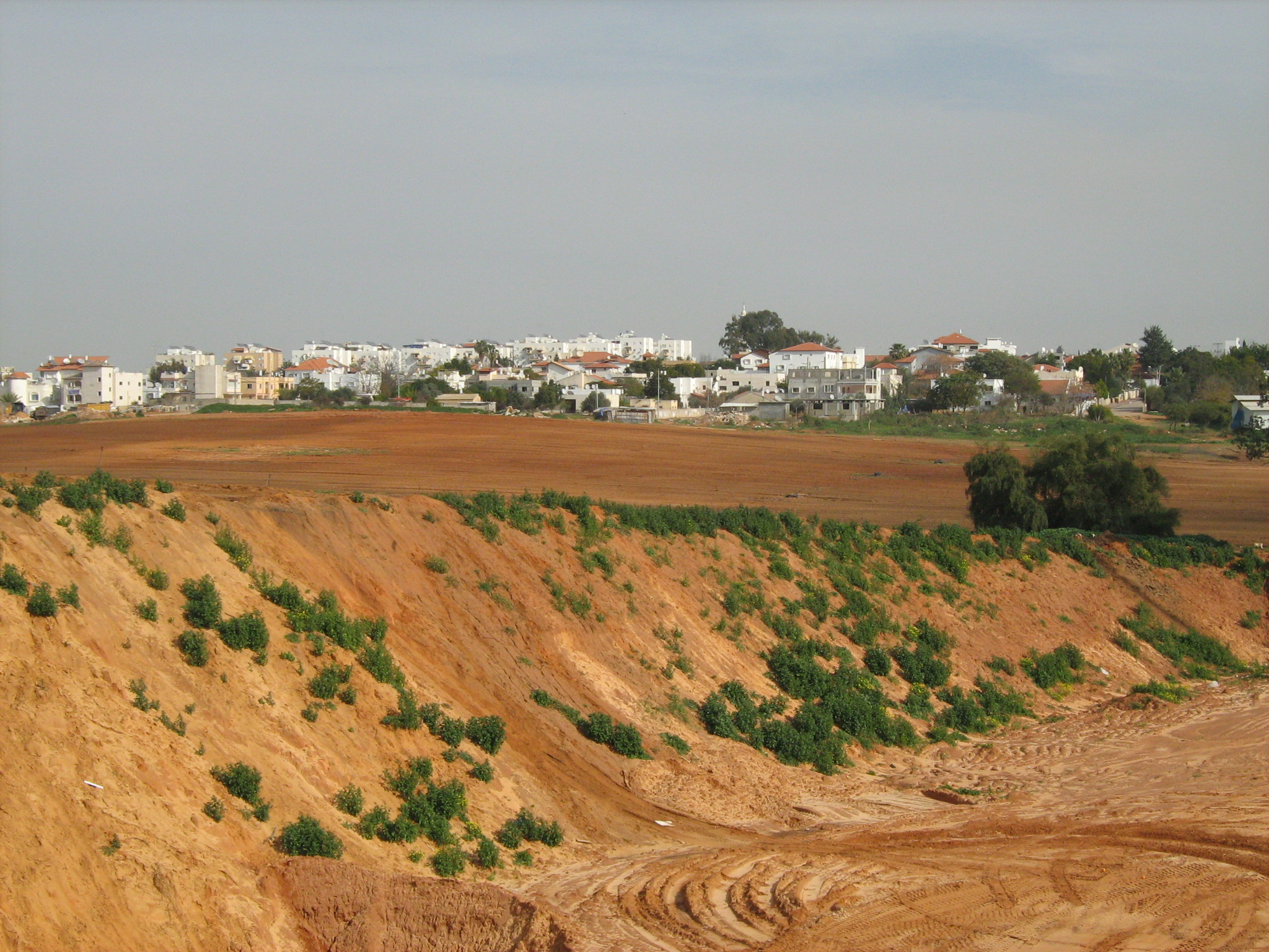 ג'ואריש מכביש 431